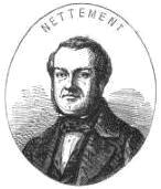 "La Commission de permanence de l'Assemblée nationale". (Détail : "NETTEMENT")